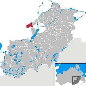 Blankenhof in Mecklenburg-Vorpommern, Landkreis Mecklenburg-Strelitz